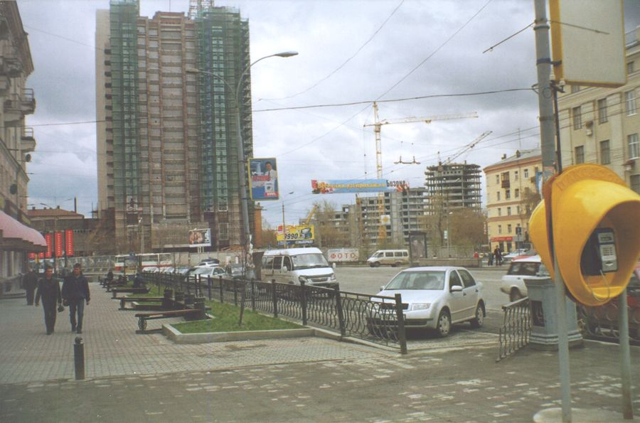 eo Nova konstruado en Jekaterinburg (2005). ru Новое строительство в Екатерибурге (2005). La fonta bildo de cxi tiu bildo estas ankaux en mia propra retpagxaro [1] Mi, auxtoro de la bildo, permesas al cxiuj uzi gxin kun cxi tiuj kondicxoj